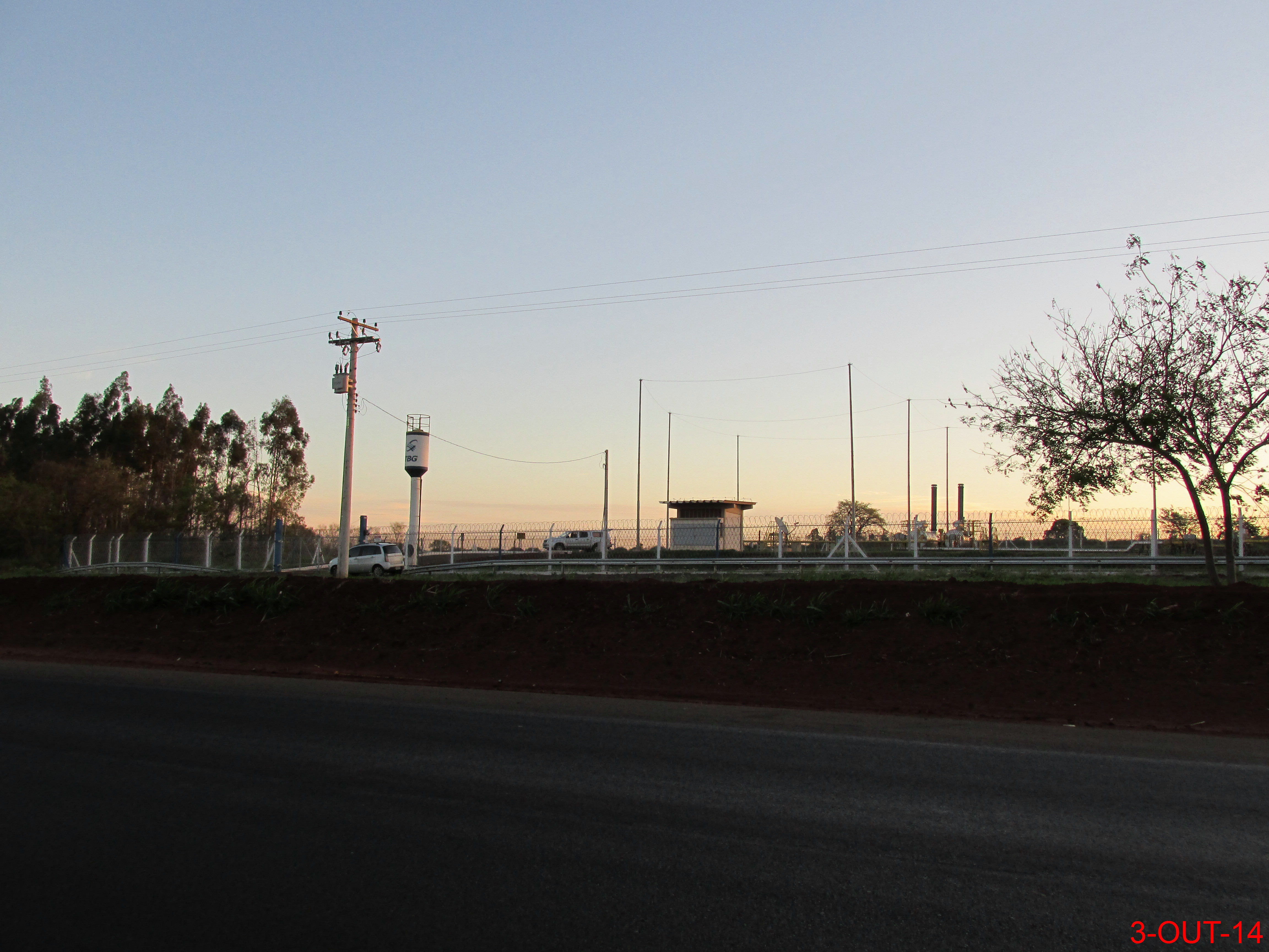 Gasoduto Brasil-Bolívia passando pela rodovia SP-304. O Gasoduto de gás natural tem 3150 quilômetros de extensão, sendo 557 em território boliviano (trecho administrado pela GTB) e 2593 em território brasileiro (trecho administrado pela TBG). O Gasoduto começa em Santa Cruz de La Sierra (Bolívia) até Canoas (Rio Grande do Sul- Brasil), percorrendo os Estados de Mato Grosso do Sul, São Paulo, Paraná e Santa Catarina, cortando 135 municípios.